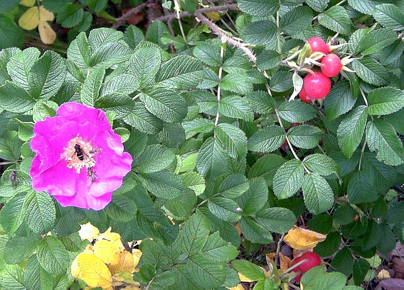 Hagebuttenstrauch mit Blüte, Germany.